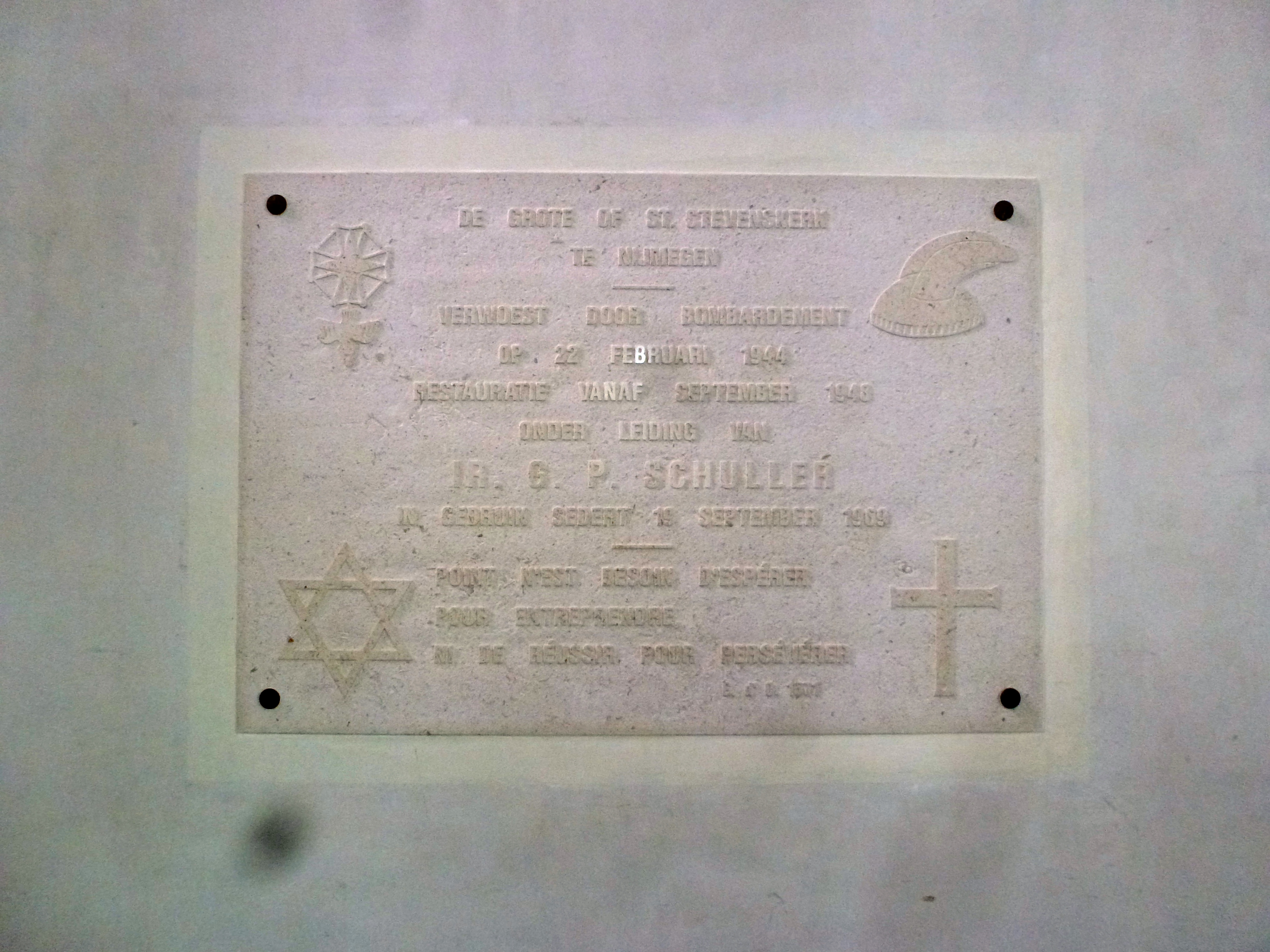 Nijmegen St Stevenskerk plaquette bombardement 22 februari 1944. Tekst: (Links vierpuntige ster met daaronder de duif van de christelijke Heilige Geest, rechts afbeelding hoed met twee buizen ? Tekst op de stenen plaquette in hoofdletters, hier voor de leesbaarheid met hoofd- en kleine letters) De Grote of St. Stevenskerk te Nijmegen - Verwoest door bombardement op 22 februari 1944 Restauratie vanaf september 1948 onder leiding van Ir. G.P. Schuller in gebruik sedert 19 september 1969 - (Links Joodse zespuntige ster, rechts christelijk kruis) Point n'ést besoin d'espérer pour entreprendre ni de réussir pour perséverer (rechts onder "perséverer" onleesbaar:) ??? ??? Het motto wordt toegeschreven aan de stadhouders Willem van Oranje, Willem I en III en betekent "Het is niet nodig te hopen om te ondernemen noch te slagen om te volharden", zie wikipedia.